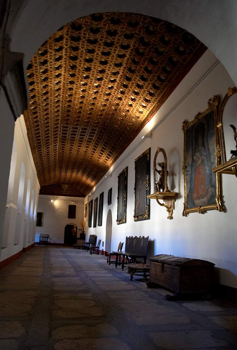 Interior del Monasterio, detalle de pasillo.